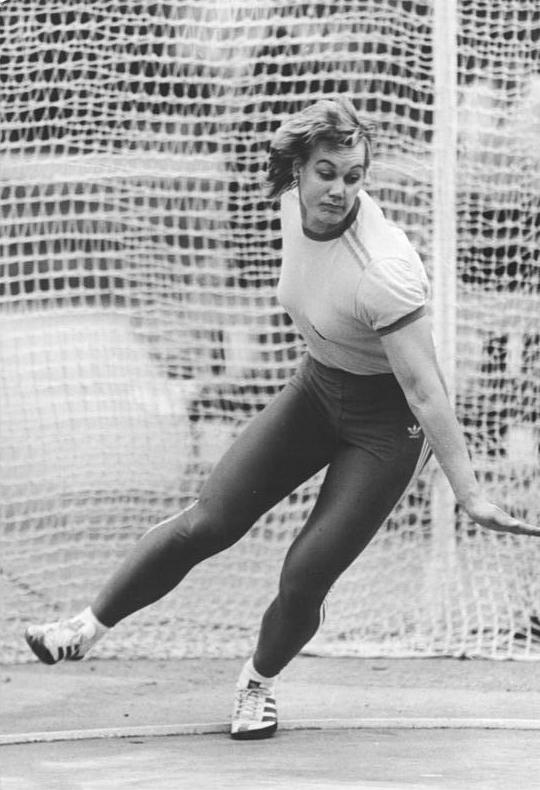 Diana Gansky ADN-ZB Oberst 11.6.87 Neubrandenburg: WM-Qualifikation der DDR-Leichtathleten- Am zweiten Tag der Weltmeisterschafts-Qualifikation der Leichtathleten in Neubrandenburg verfehlte Europameisterin Diana Gansky vom ASK Vorwärts Potsdam mit 73,32 m den DDR Rekord im Diskuswerfen nur um vier Zentimeter und schob sich damit an die dritte Stelle der "ewigen" Weltbestenliste.